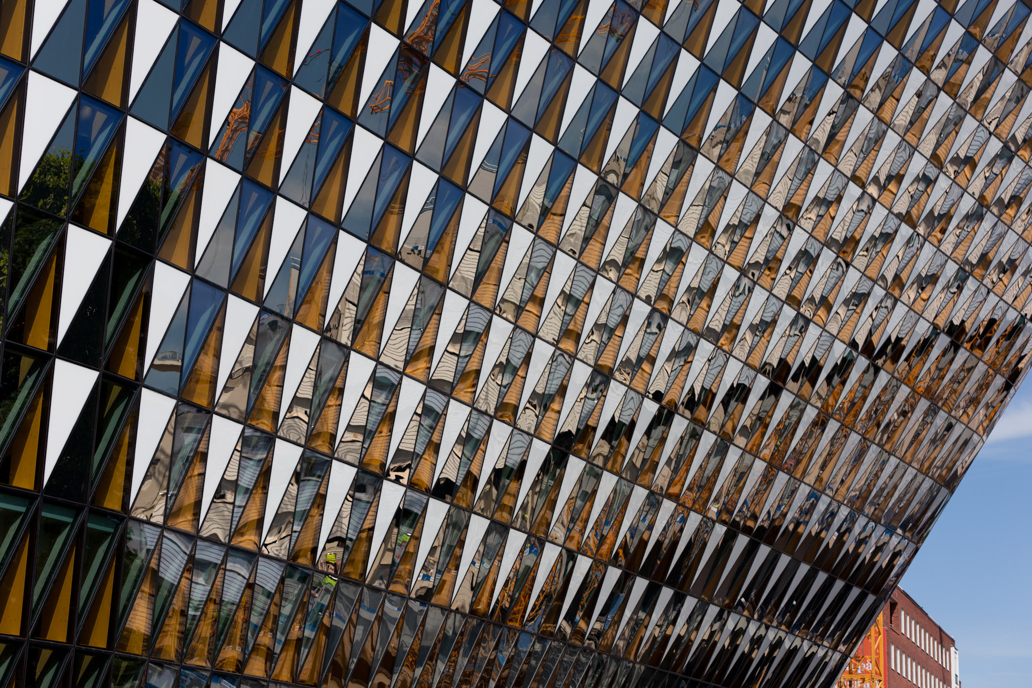 Aula Medica, Karolinska Institutet